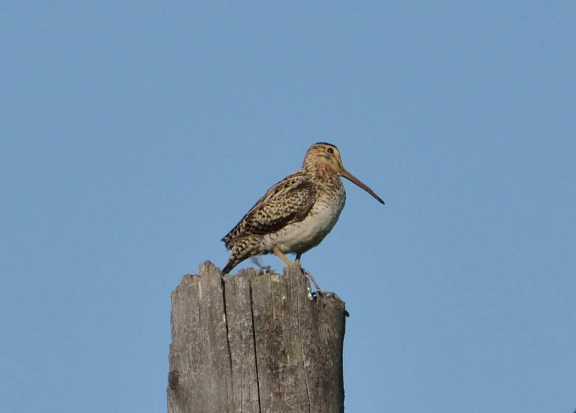 Лесной дупель